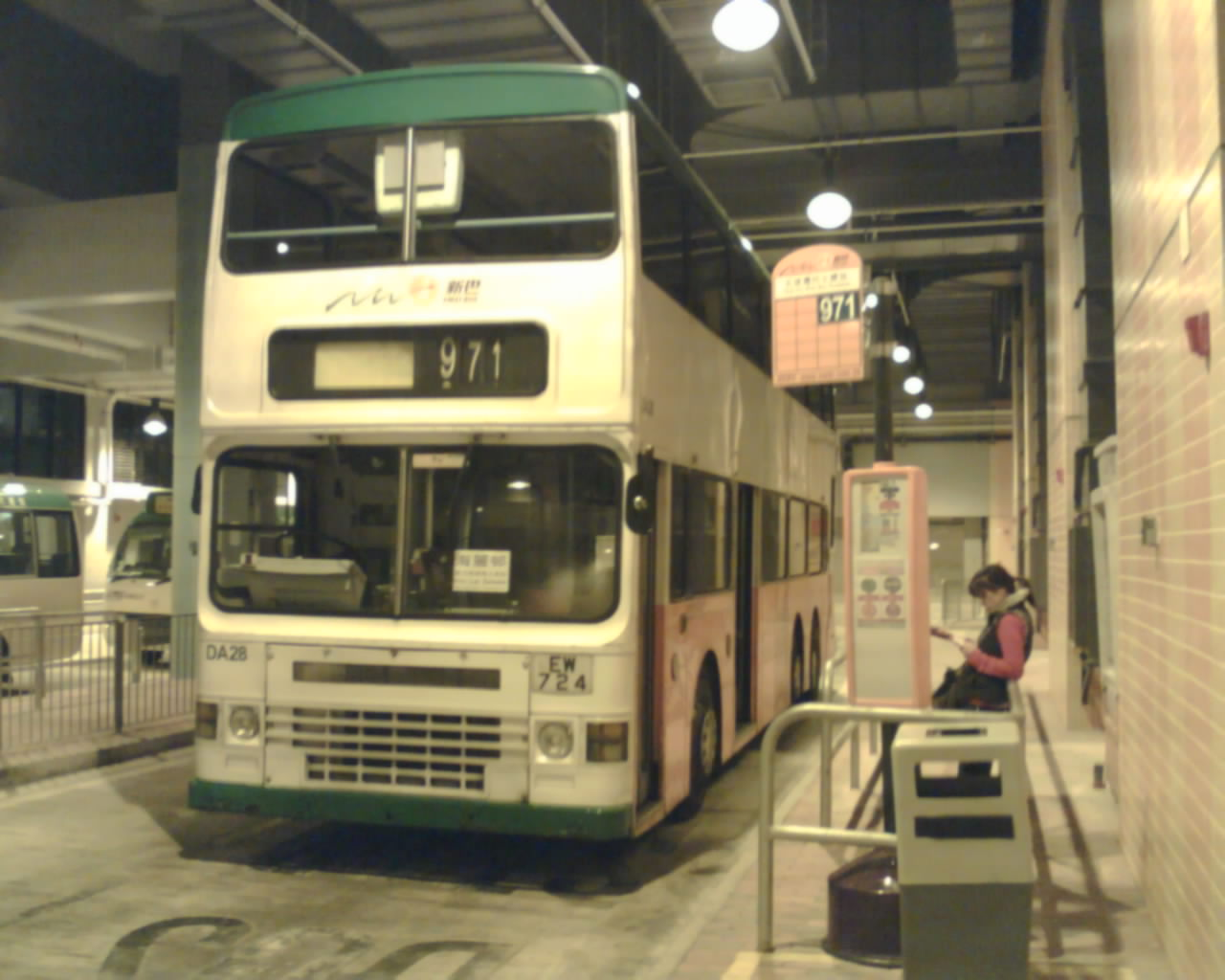 新世界第一巴士的編號DA28巴士，停於石排灣巴士總站。